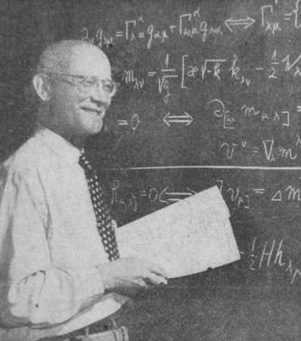 Václav Hlavatý (1894-1969), český matematik